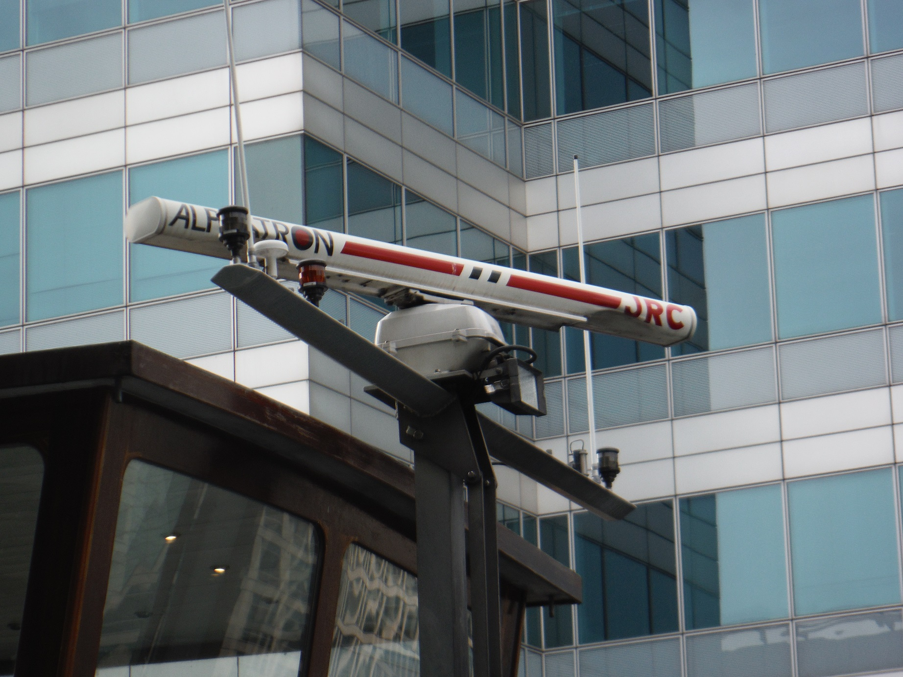 ALPHATRON JRC RADAR@Canary Wharf, UK